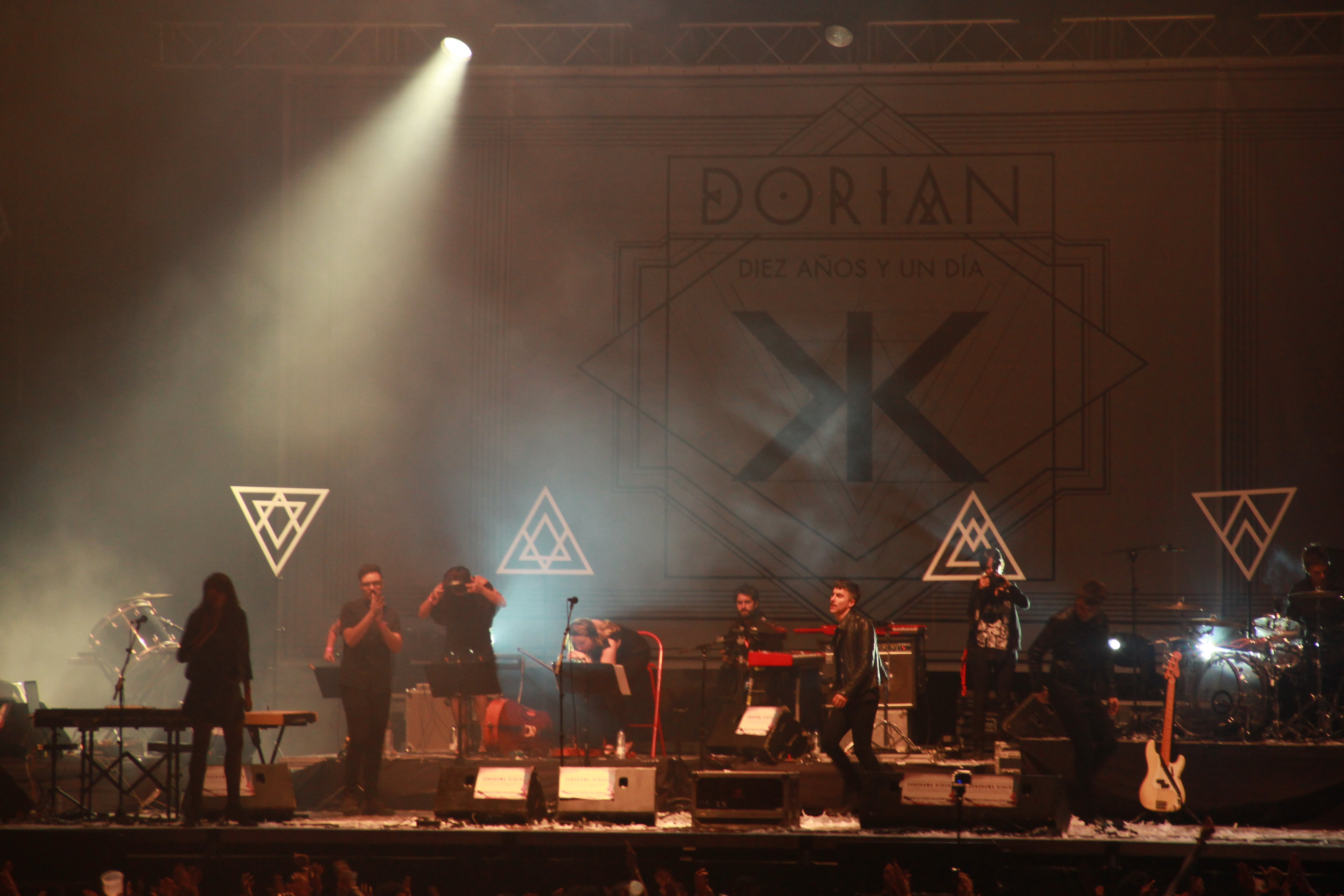 Dorian durante su concierto en el Festival Sonoroma 2015, en Aranda de Duero, Burgos, España.